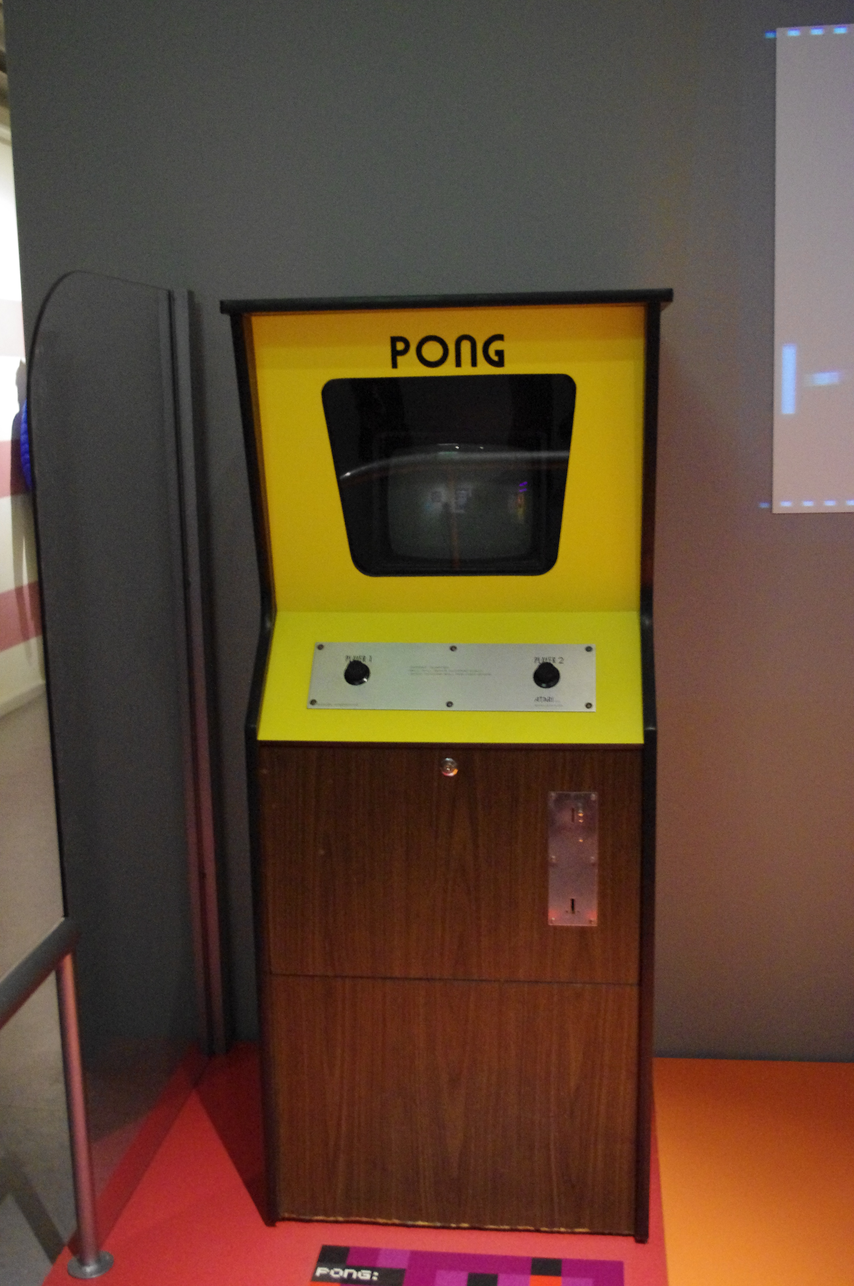 Pong